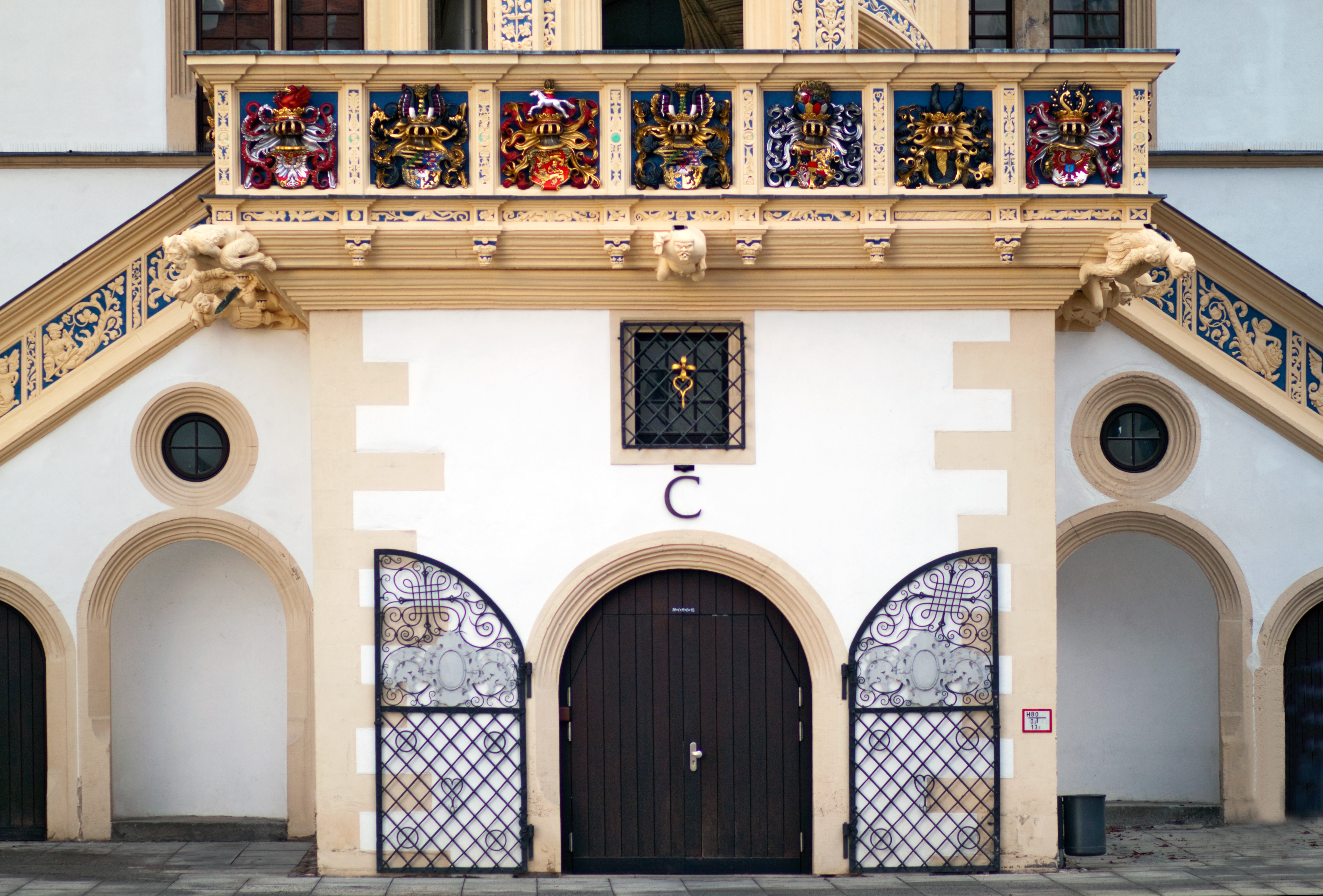 Schloss Hartenfels Torgau Wappengalerie unterhalb des Großen Wendelstein